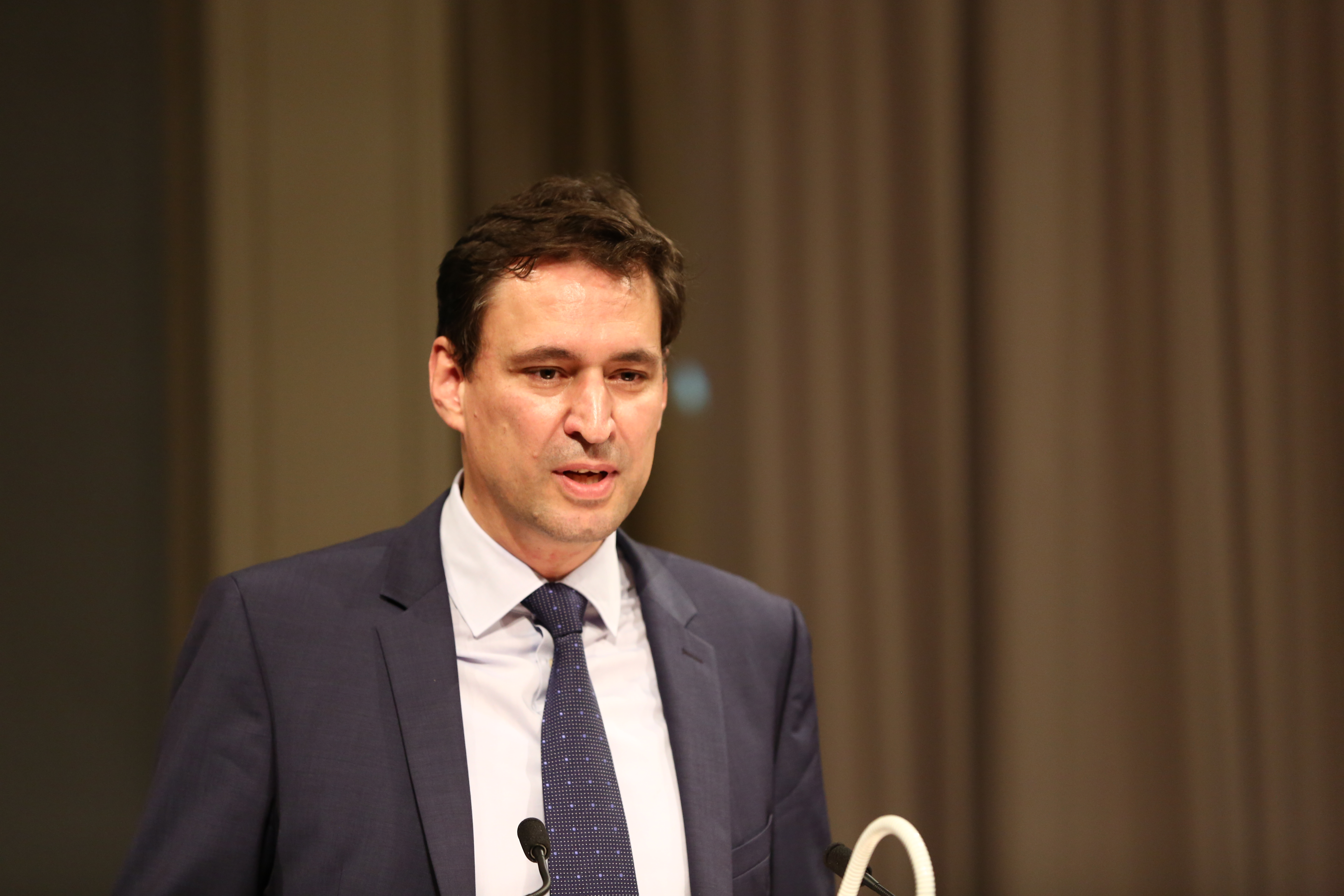 Georg Eisenreich, Staatssekretär im Bayerischen Staatsministerium für Kultus und Wissenschaft Verleihung des Thomas-Mann-Preis_2017 der Hansestadt Lübeck und der Bayerischen Akademie der Schönen Künste an Brigitte Kronauer. 18. Oktober 2017 in der Münchner Residenz.